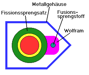 Skizze der Neutronenbombe, für den Artikel Atomwaffentechnik.